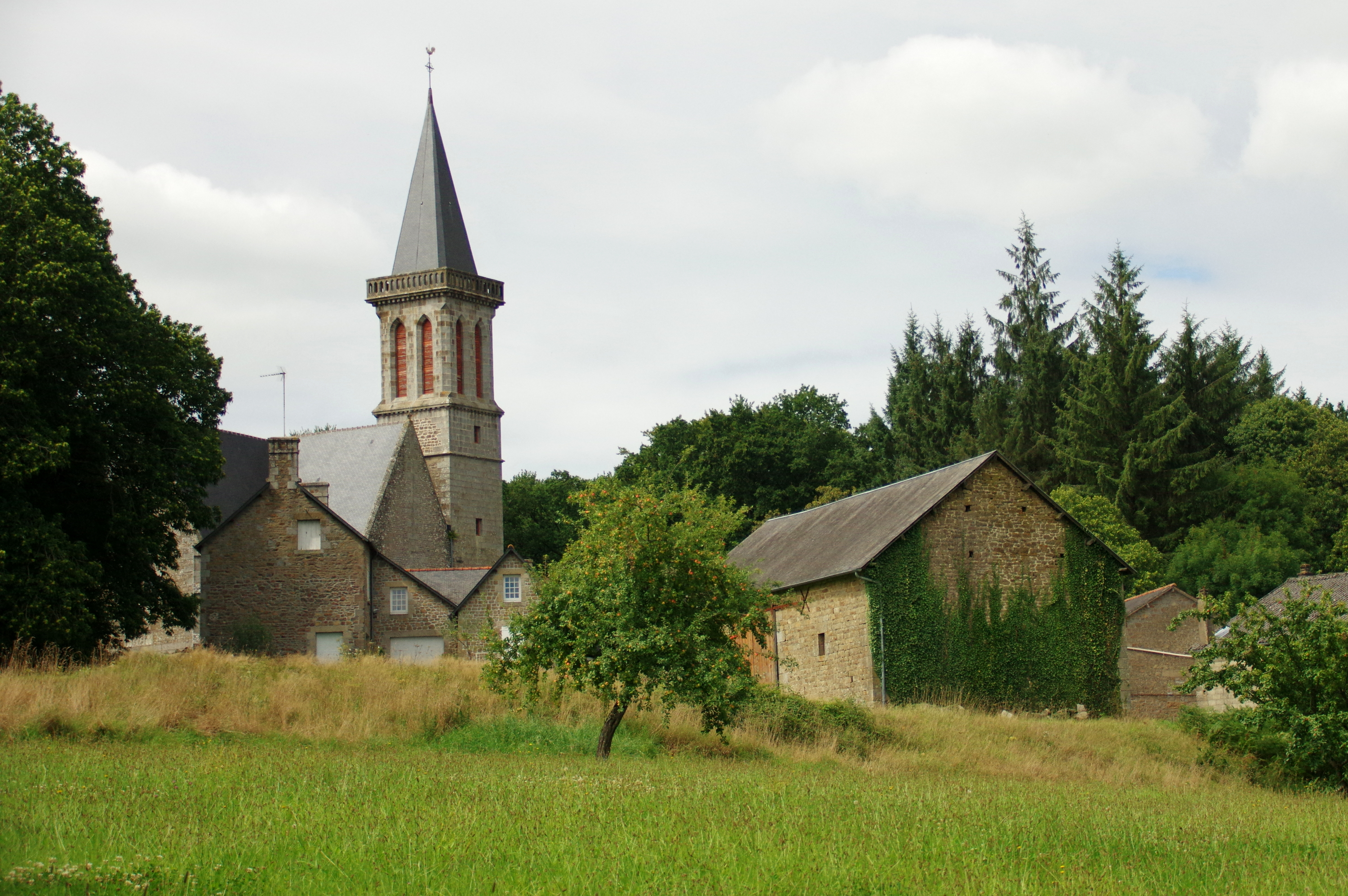 Vue sur Le Chatellier en Ille-et-Vilaine, avec l'église.